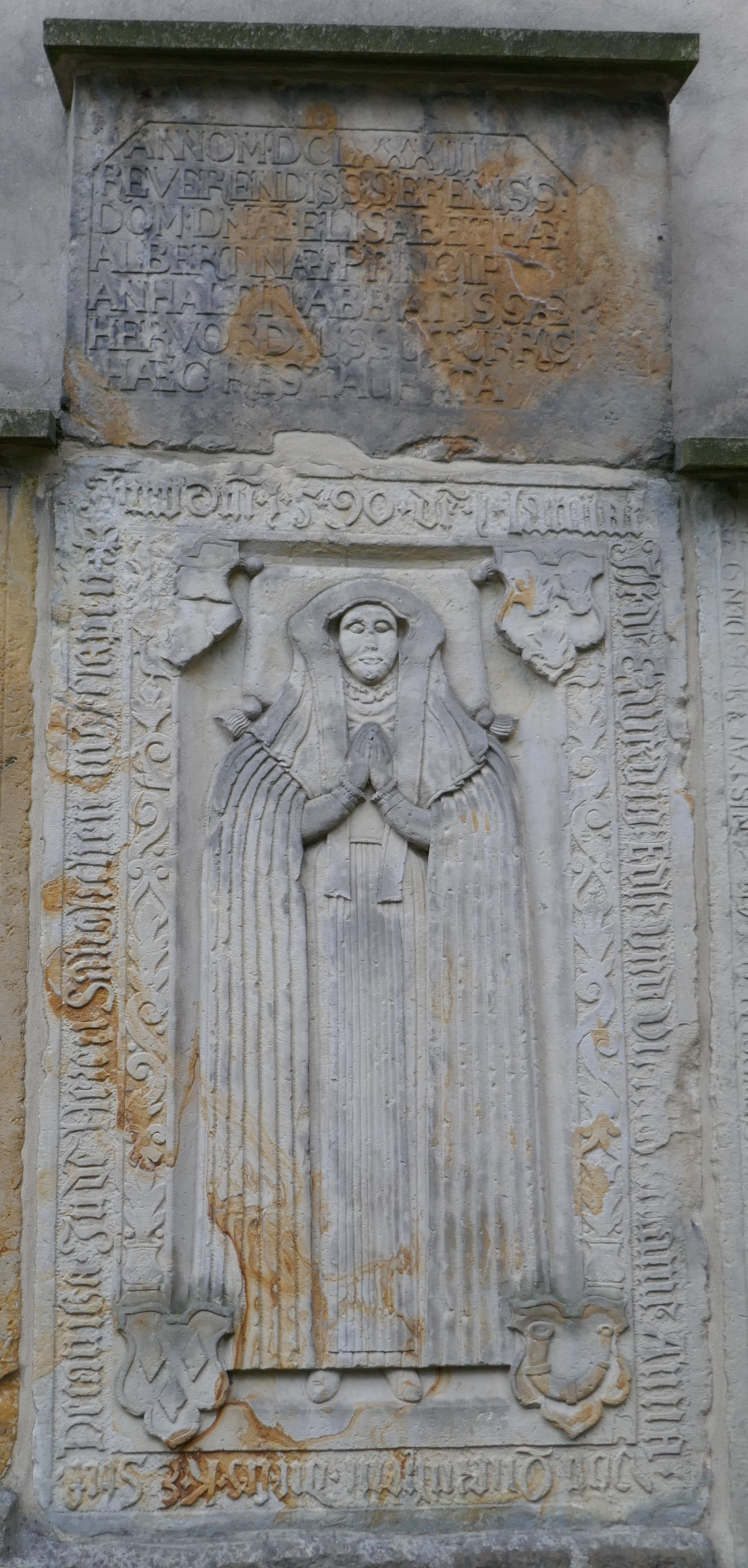 Grabplatte Anna von Quernheim an der Westseite der Marienkirche in Herford